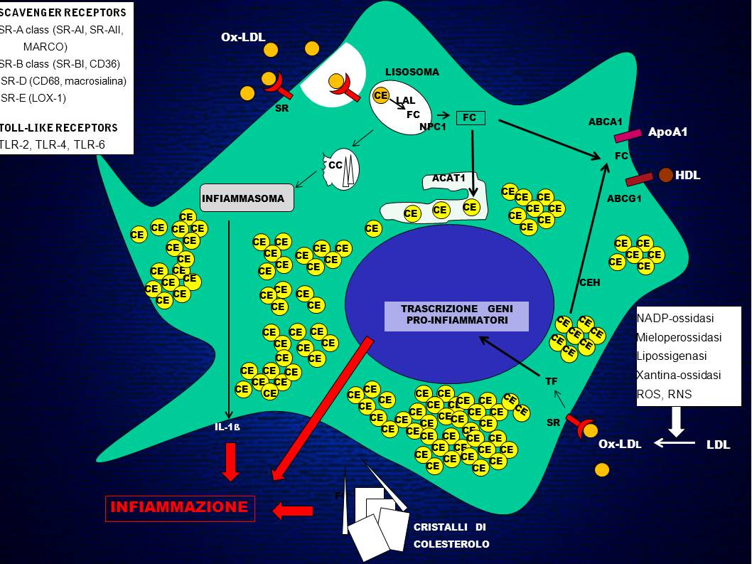 Effetti delle ox-LDL nei macrofagi.